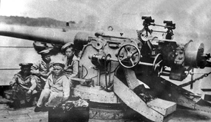 152-мм орудие крейсера Диана